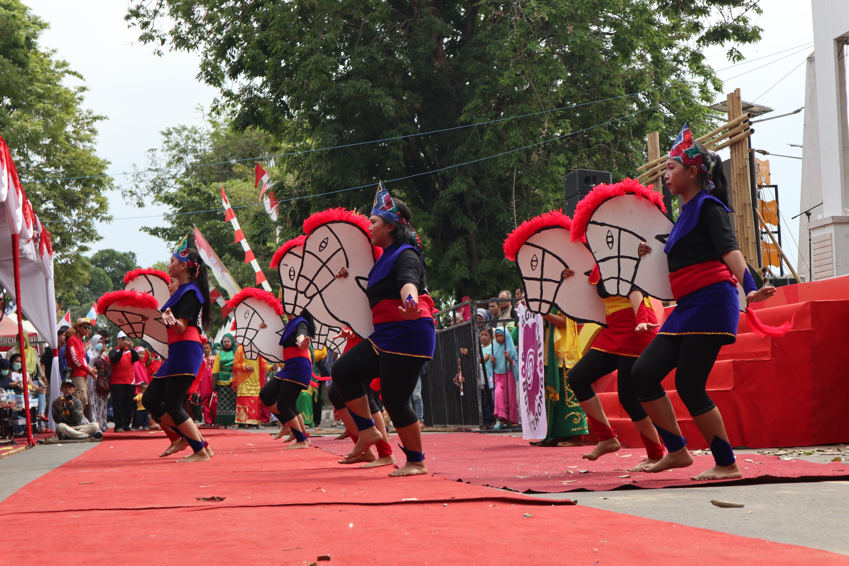 Tari kuda gepang merupakan tari tradisional Banjar.